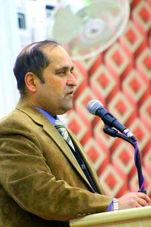 عبدالفیاض مهرآیین